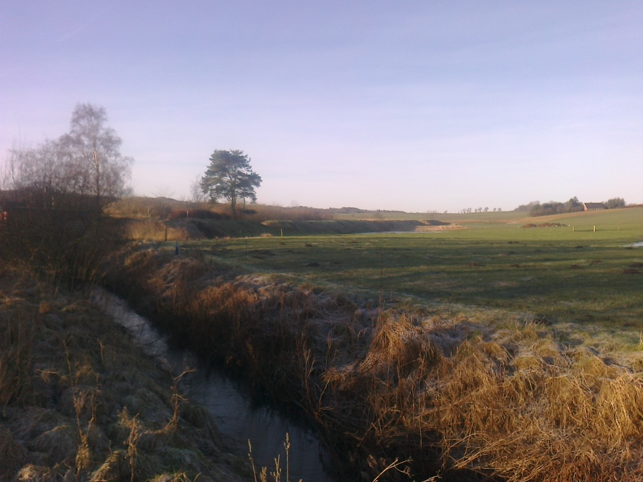 Dæmning V for Tovstrup Stationsby med bro over bækken